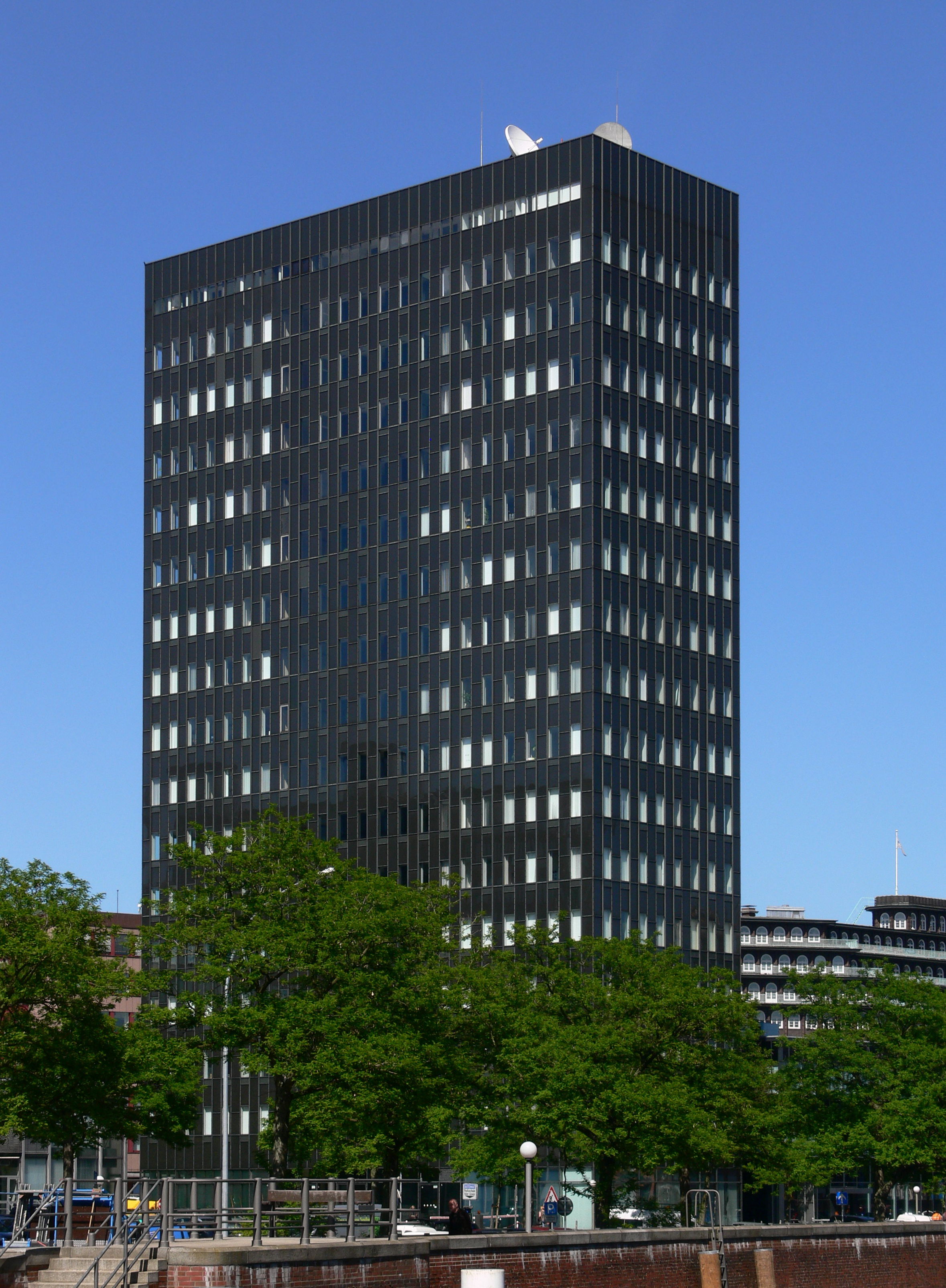 Hamburg, Hanburg, ehemaliges IBM-Haus